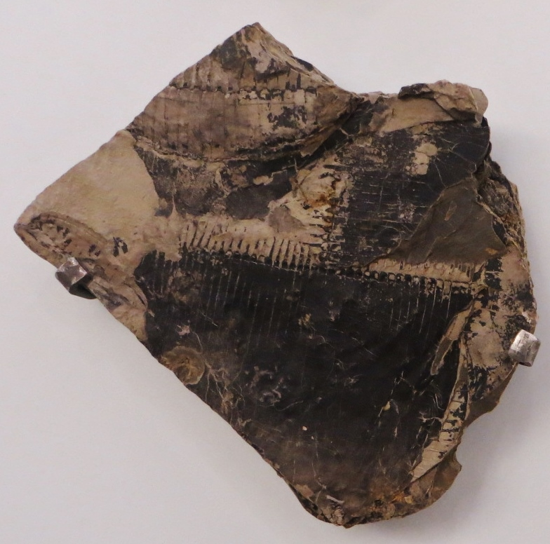 Fossil of Equisetites - Took the picture at Museum am Lowentor, Stuttgart